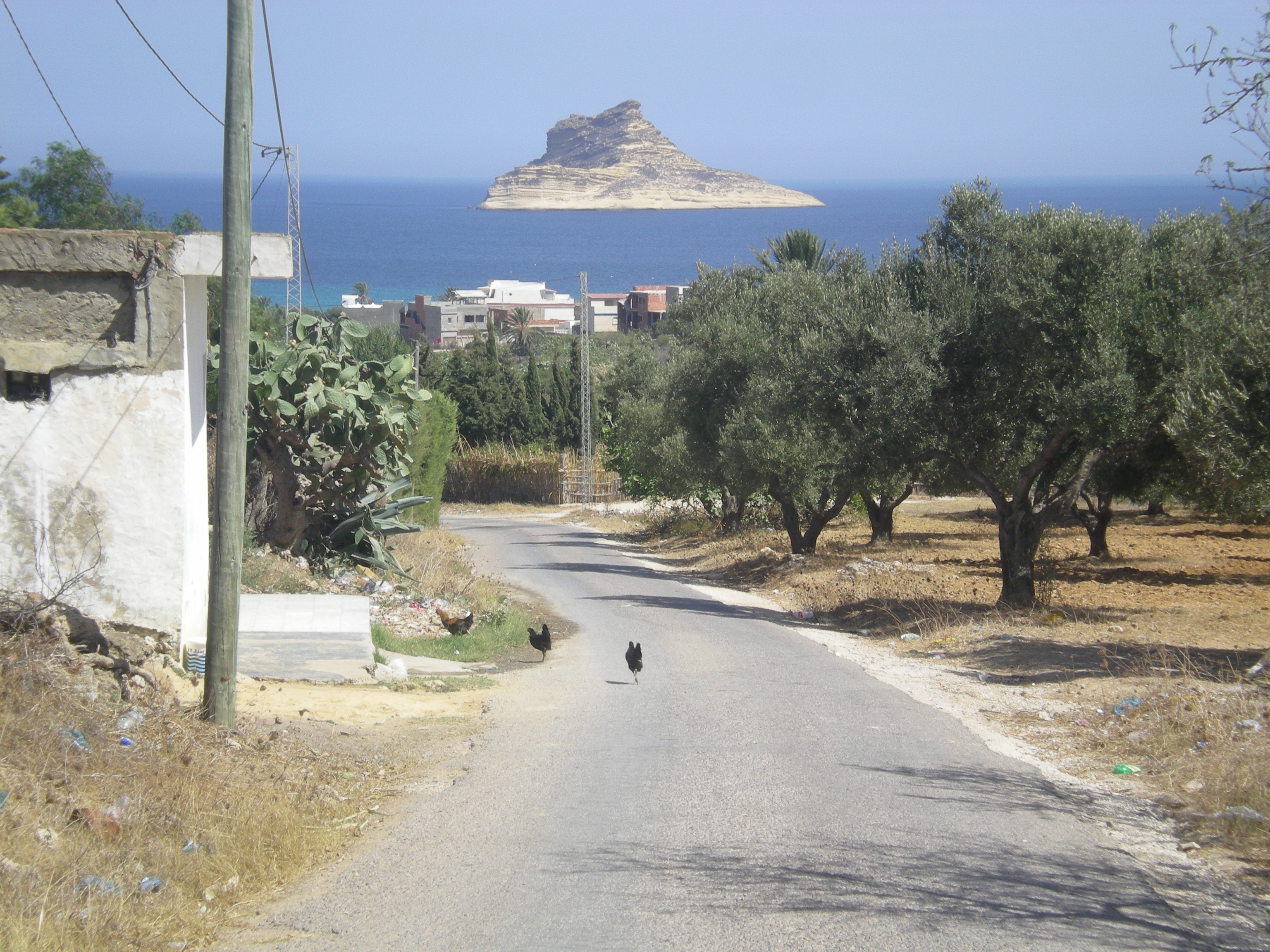 Ile Pilau au large de RafRaf, north Tunisia